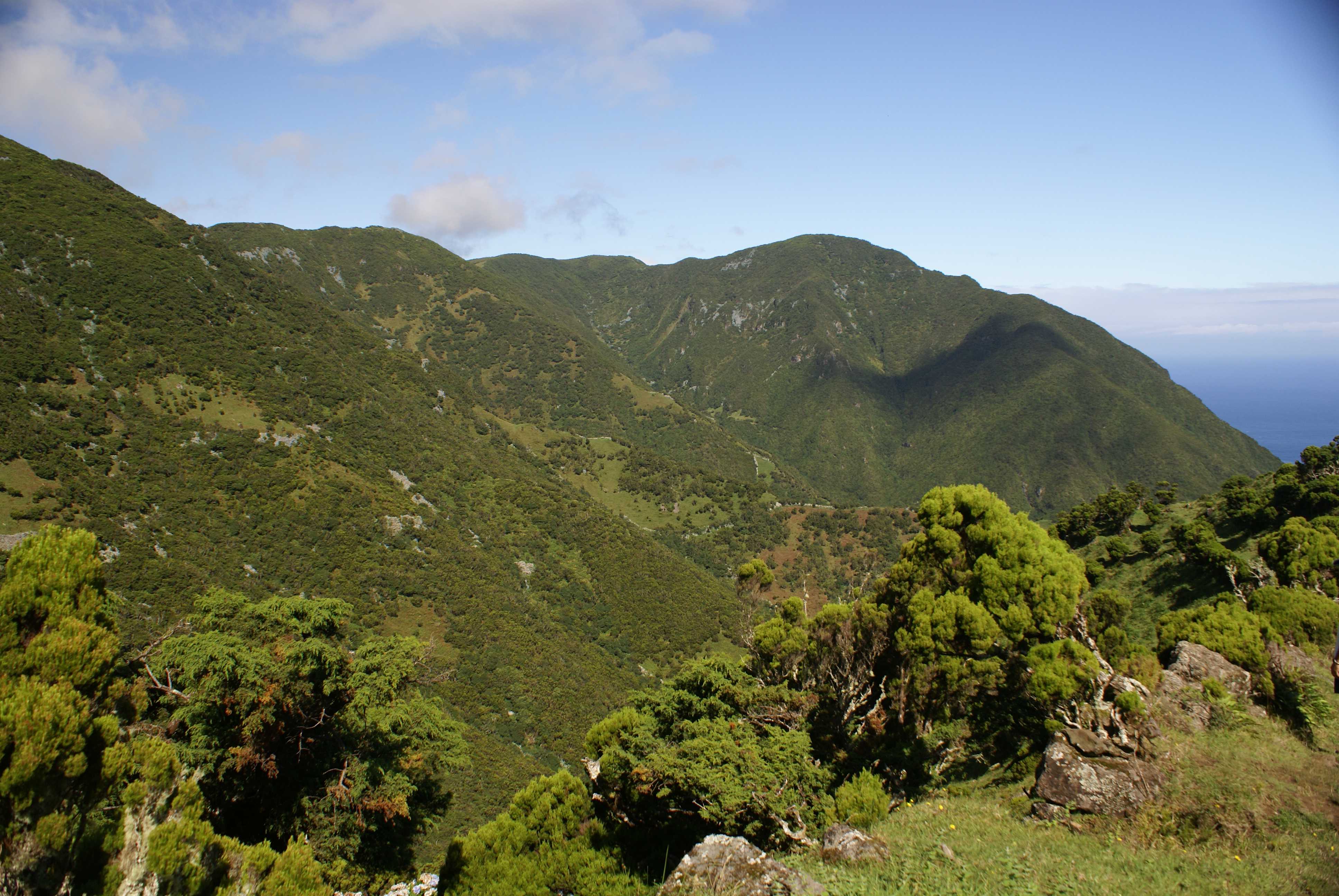 Caminho pedestre da Serra do Topo para a Fajã de Santo Cristo, vista 3, Calheta, ilha de São Jorge, Açores